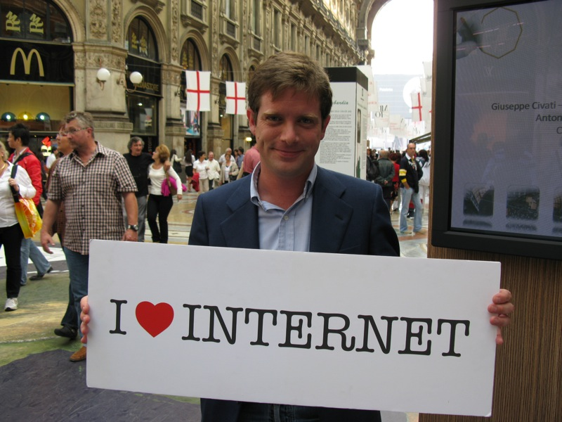 Giuseppe Civati durante una manifestazione a favore di internet